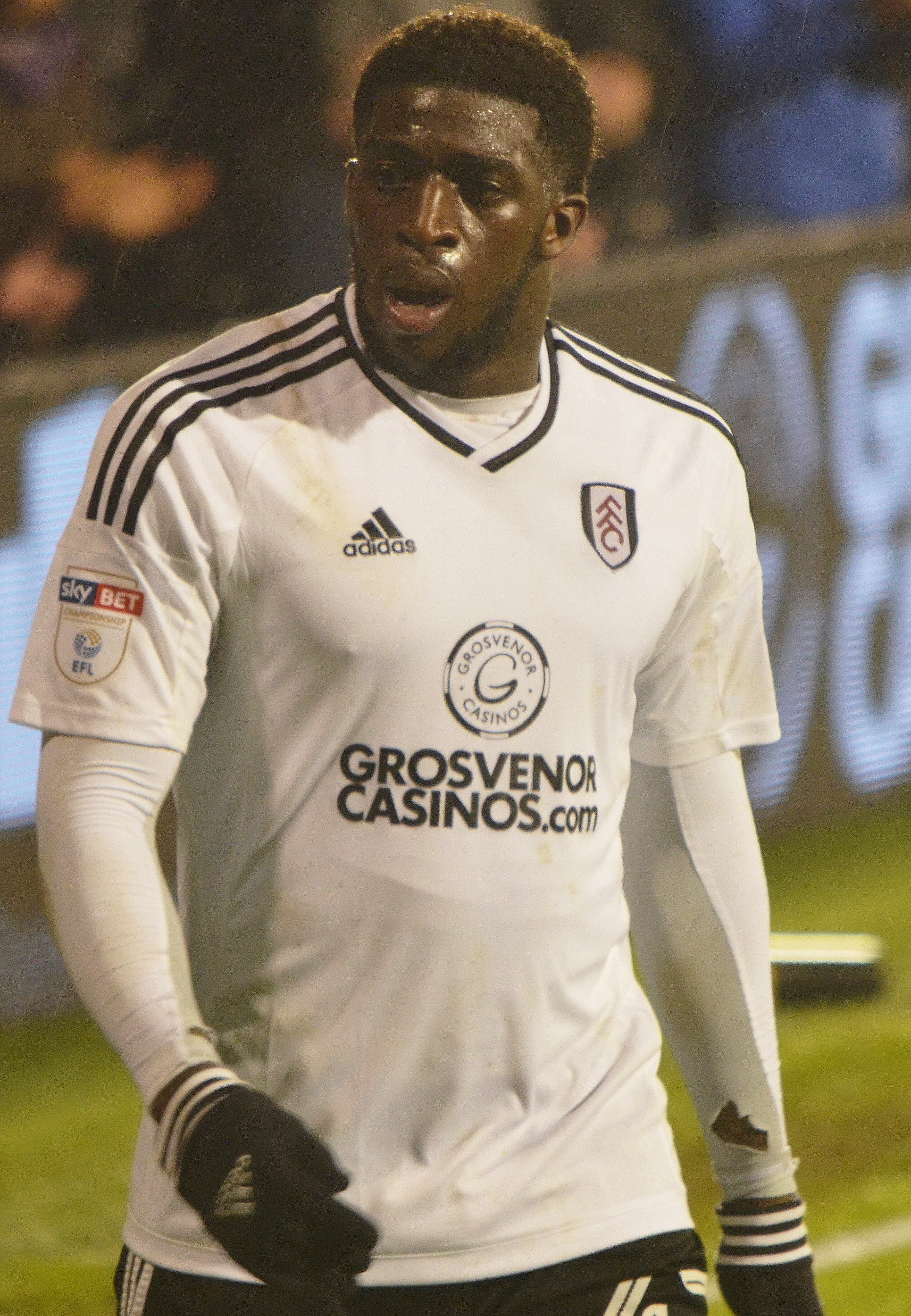 Aboukar Kamara, Fulham FC